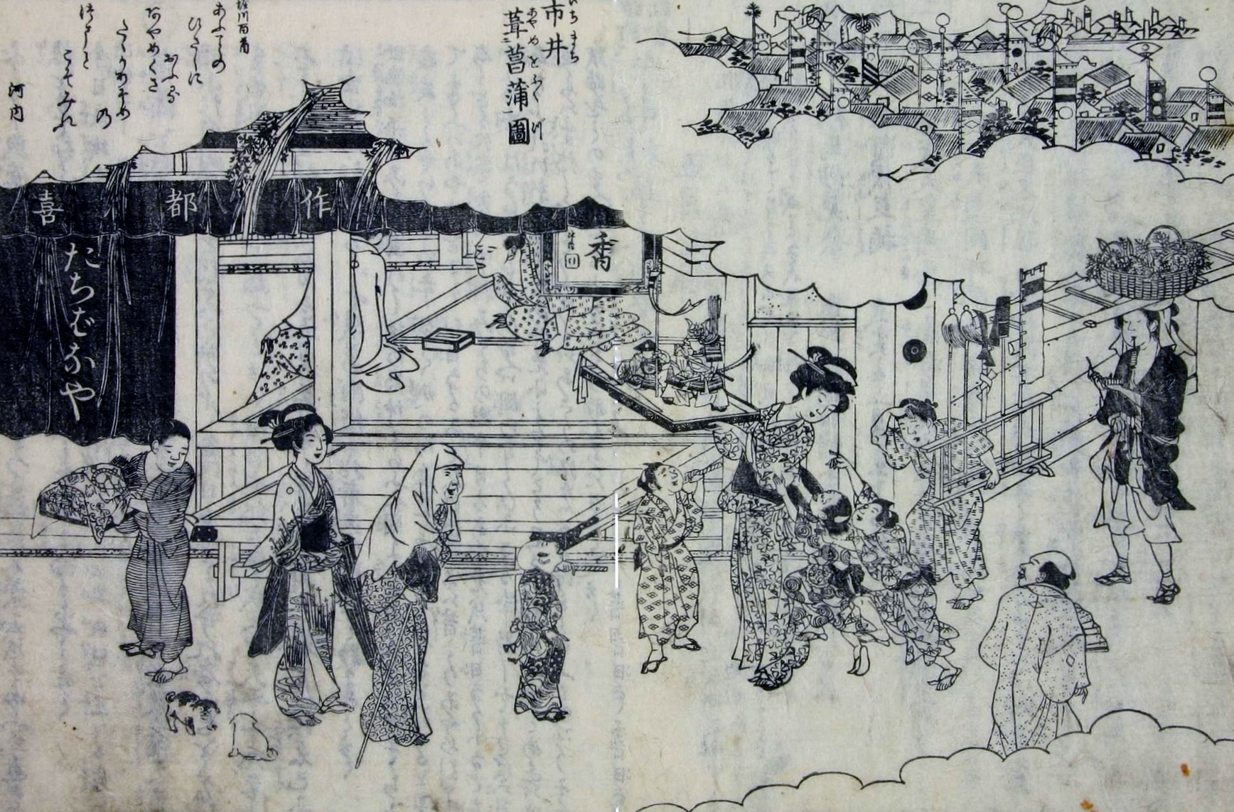 年中行事大成 速水春暁斎 画図